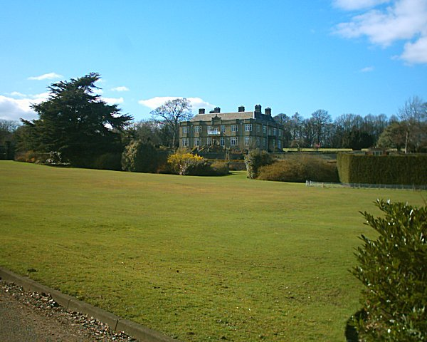 Beauchief Hall.